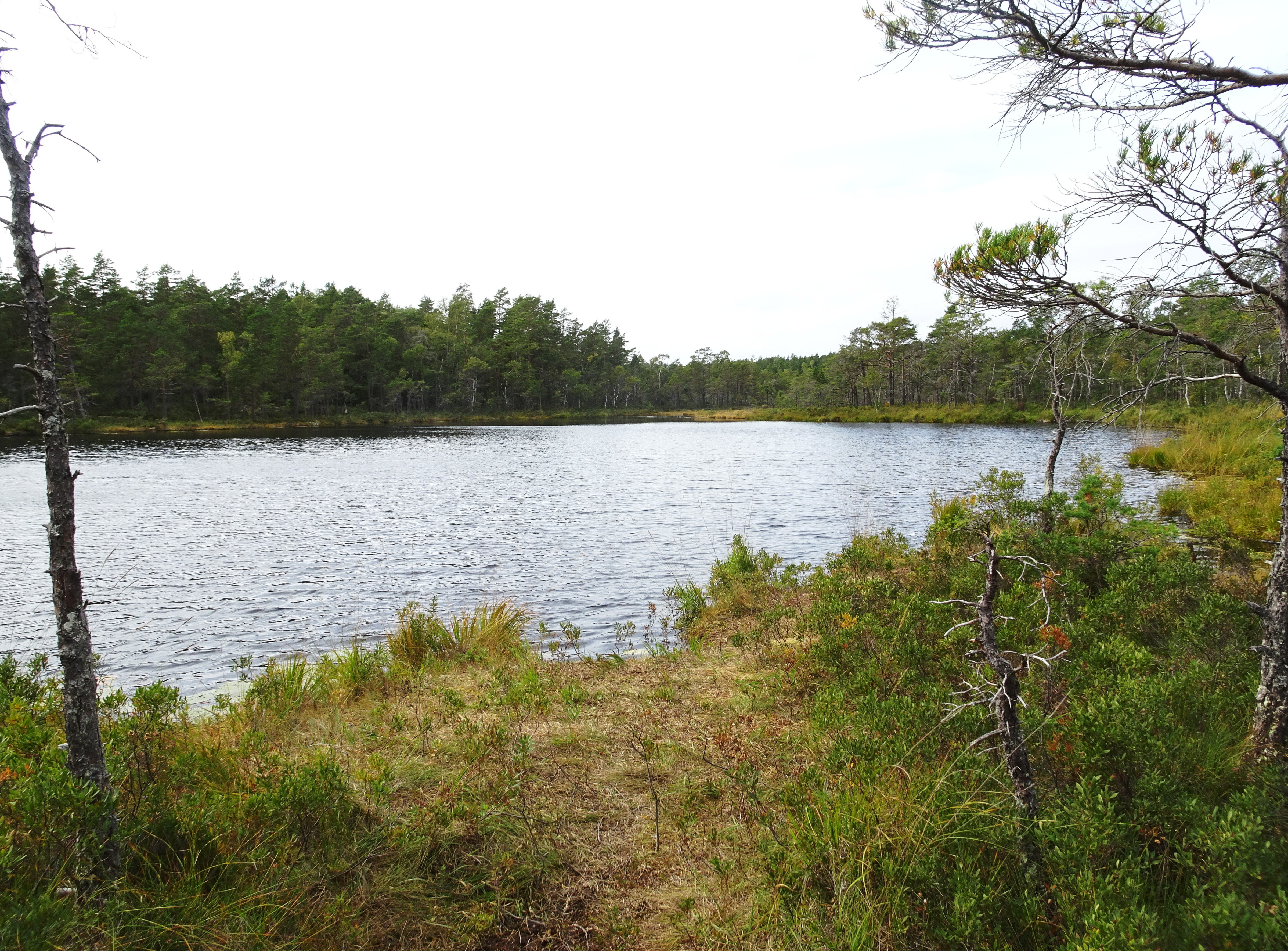 Tornbergssjön i Tornbergets naturreservat